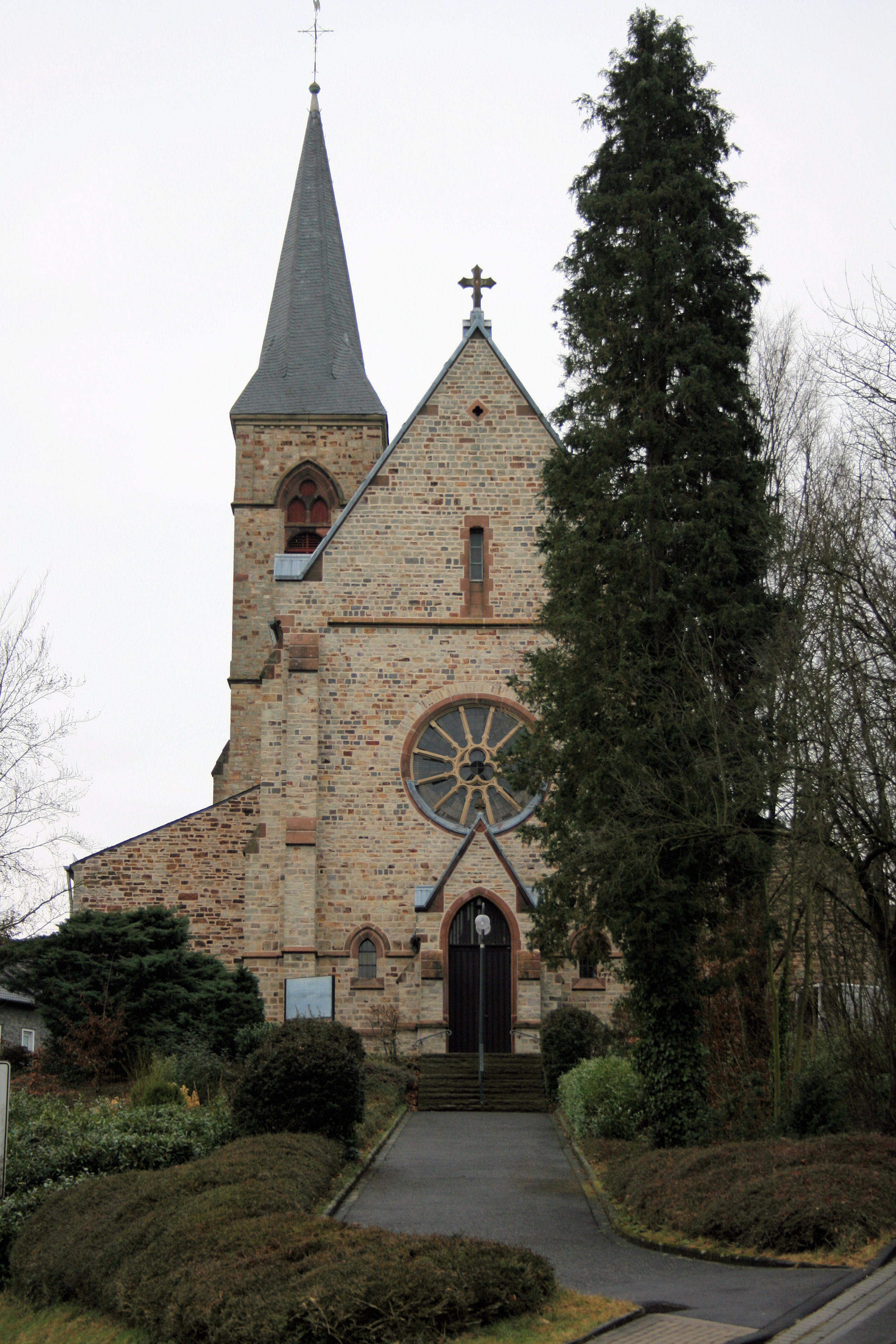 Kirche Eitorf-Muehleip